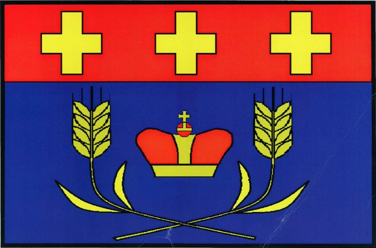 Vlajka, Uzenice, okres Strakonice